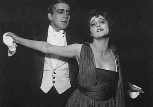 Кадр из фильма «Последнее танго» (1918)